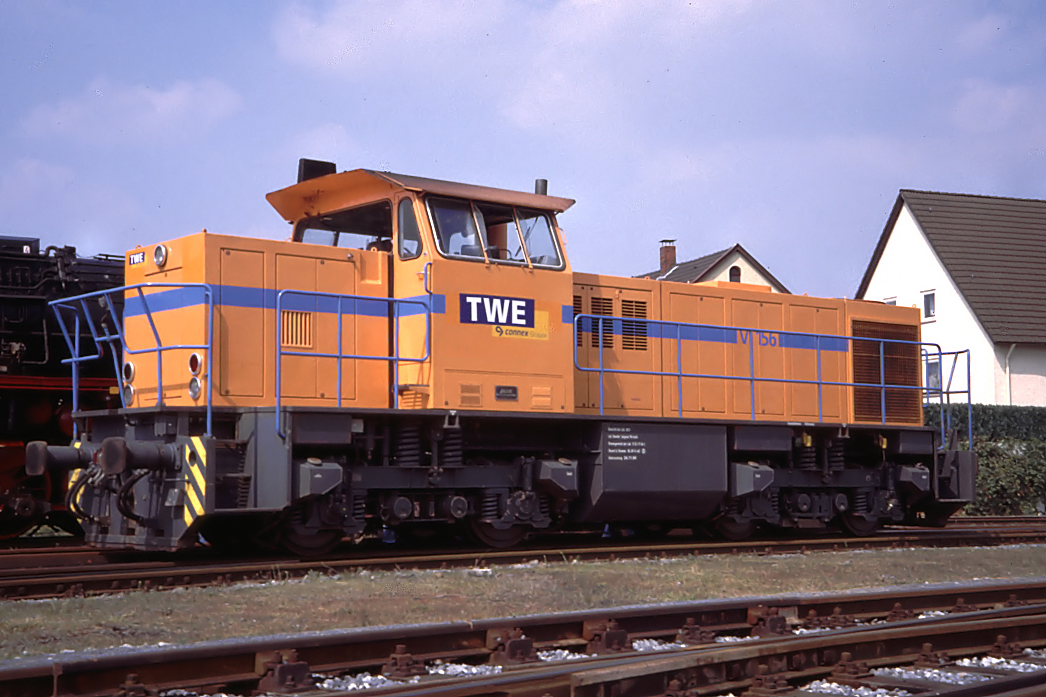 MAK G 1205 als TWE V156 in Gütersloh